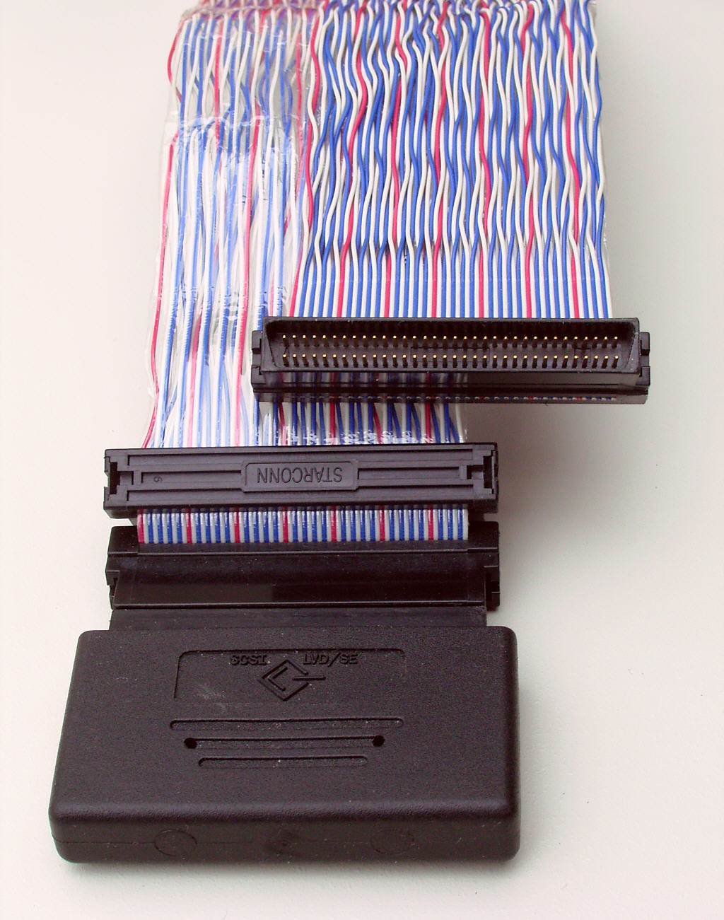 SCSI-Kabel intern, 68-polig, mit fest montiertem LVD/SE-Terminator und der für LVD-Kabel typischen Verdrillung der Signalleitungen